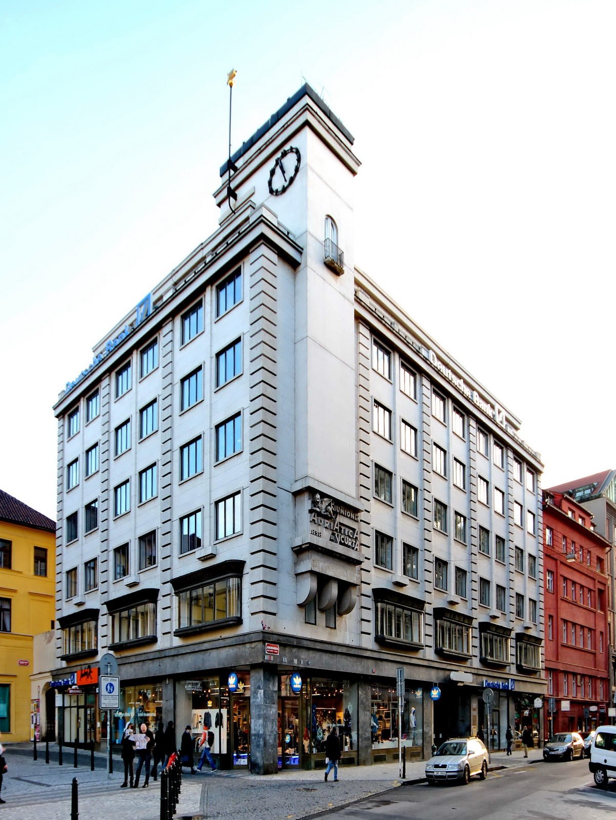 Fritz Lehmann: palác Riunione Adriatica di Sicurtà (1932), Praha 1-Nové Město, Jungmannova 34 This photograph was taken with a DSLR from WMCZ's Camera grant.